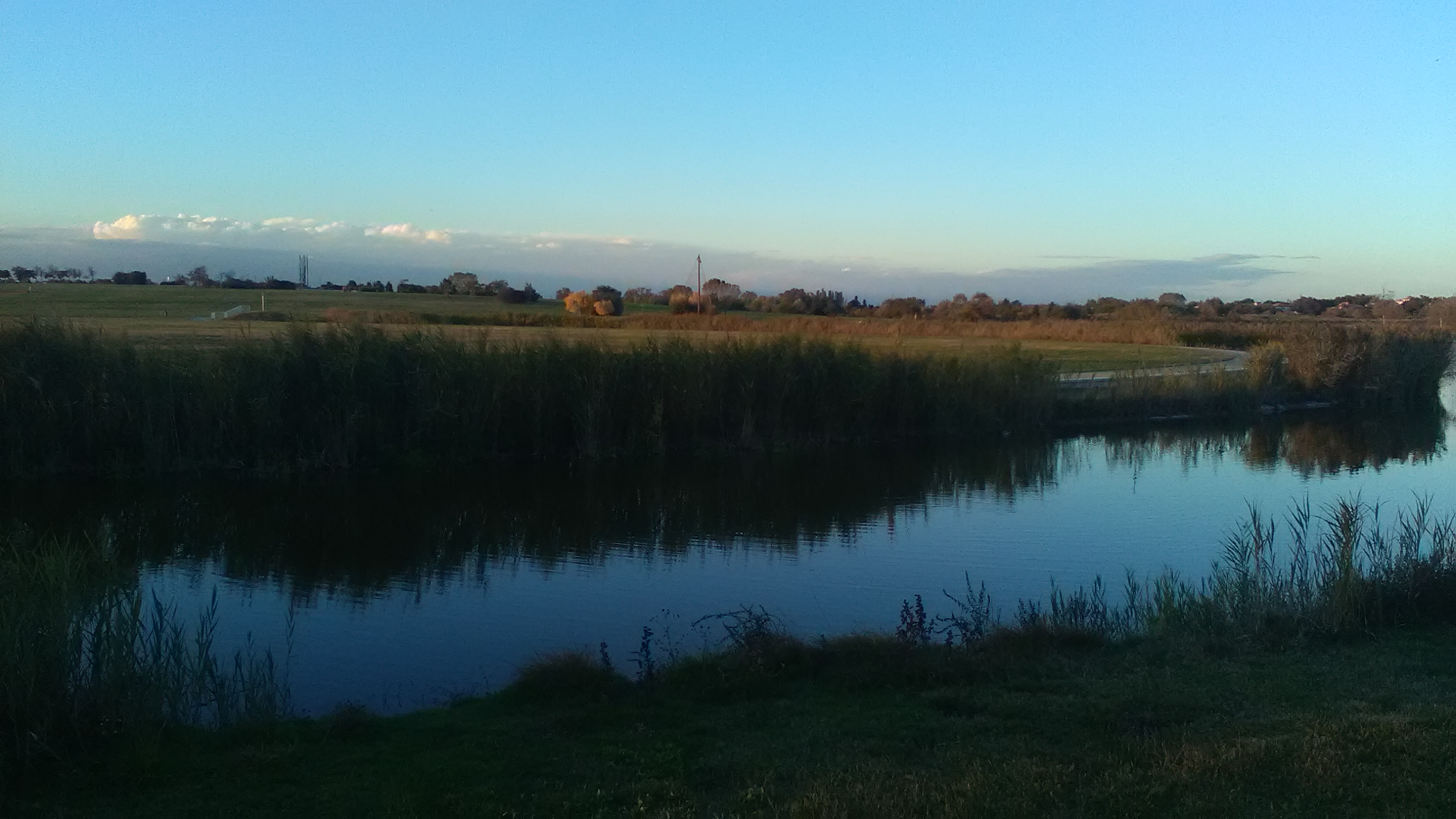 Parco San Giuliano (Mestre)